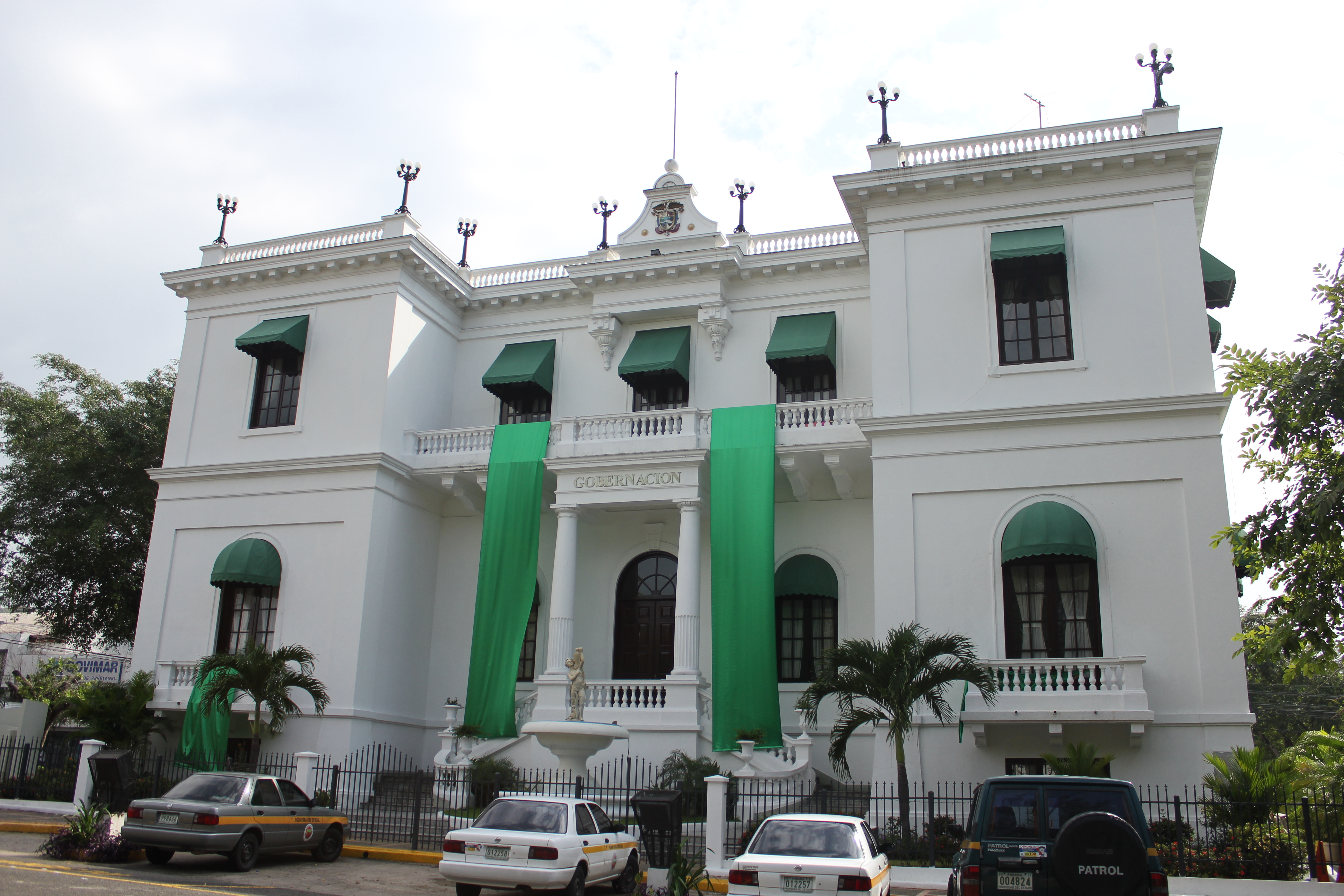 Edificio de la Gobernación de la República de Panamá.